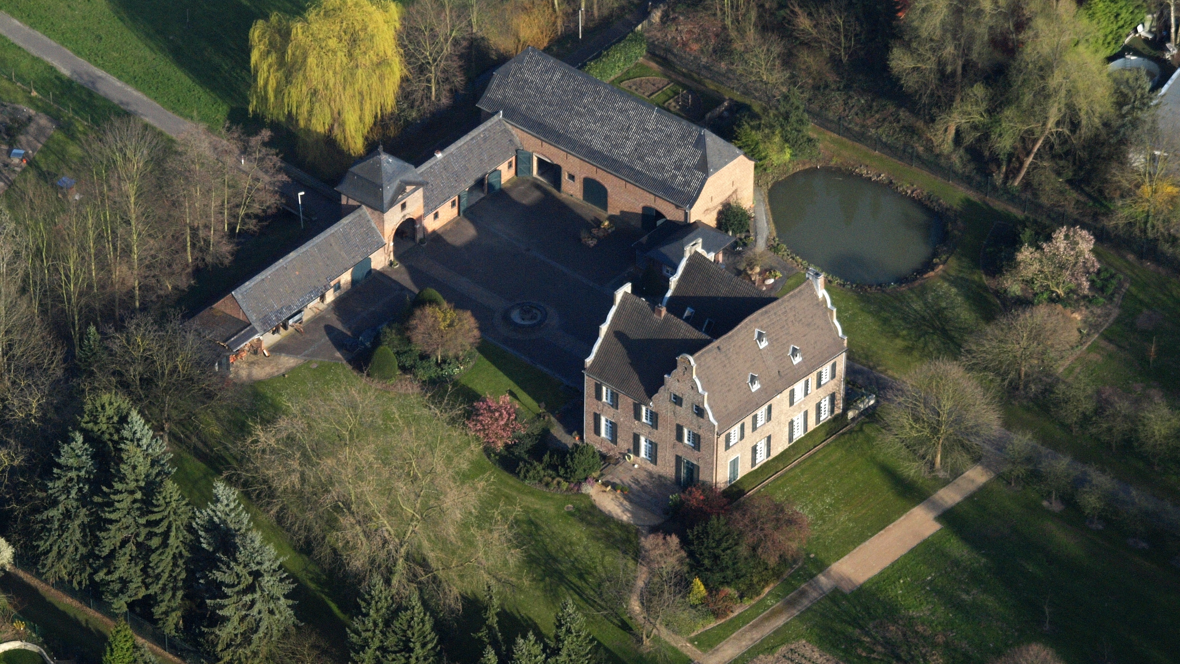 Wolfsburg, Bornheim-Roisdorf: Luftaufnahme aus nordwestlicher Richtung